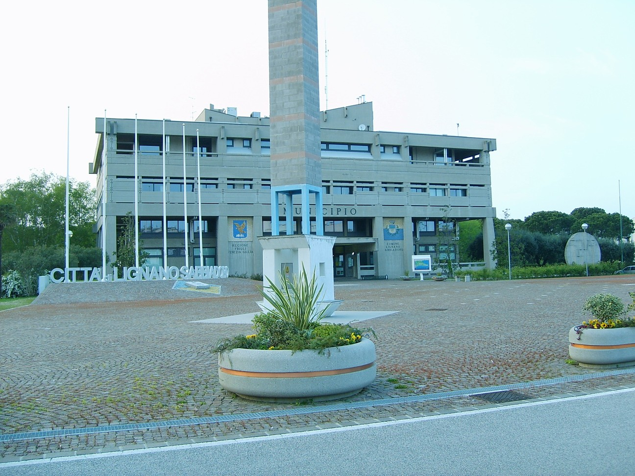 immagine del municipio di Lignano del 9 aprile 2007 realizzata da Tekkaman 2